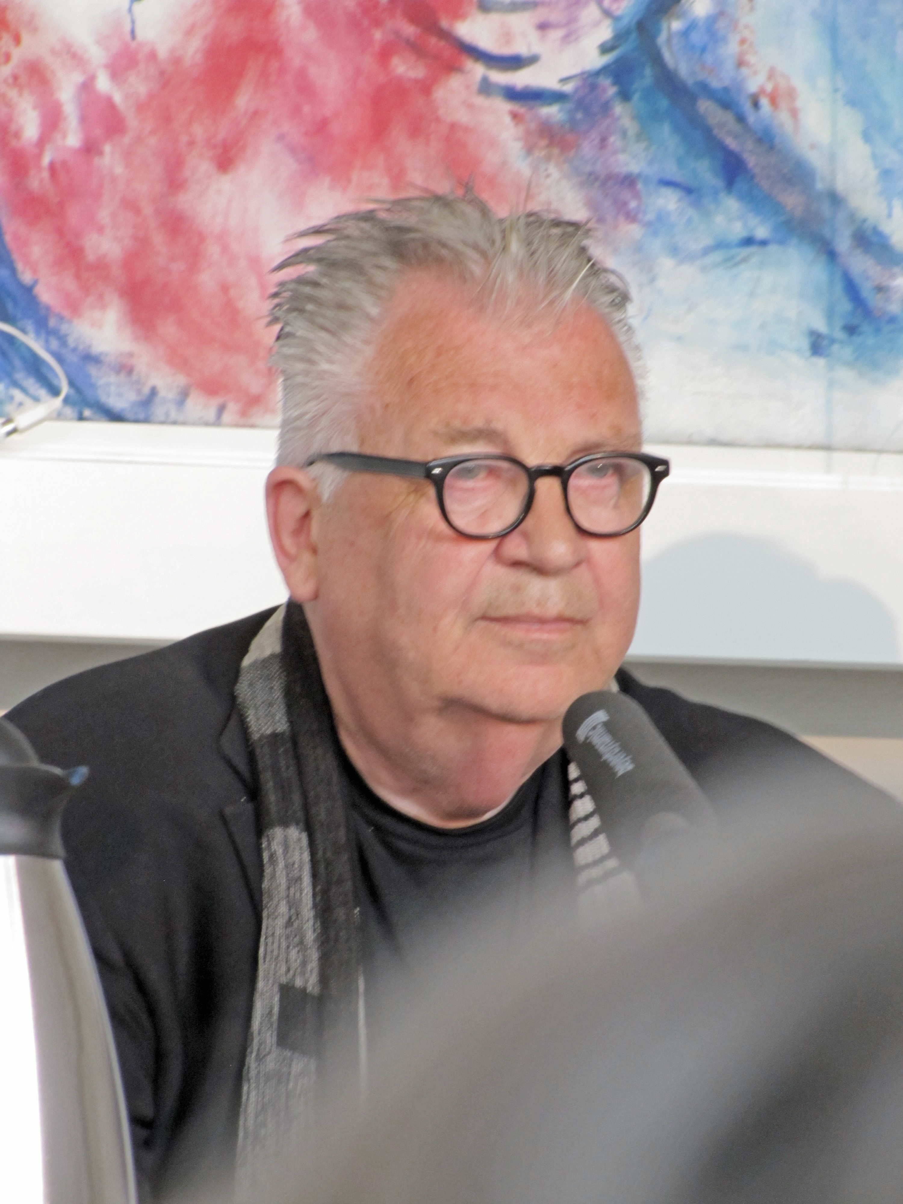 Samuel Schirmbeck, deutscher Journalist, Autor und Dokumentarfilmer für Rundfunk und Fernsehen. Podiumsdiskussion: "Panikmache oder echte Bedrohung - Wie gefährlich ist der Islam?"